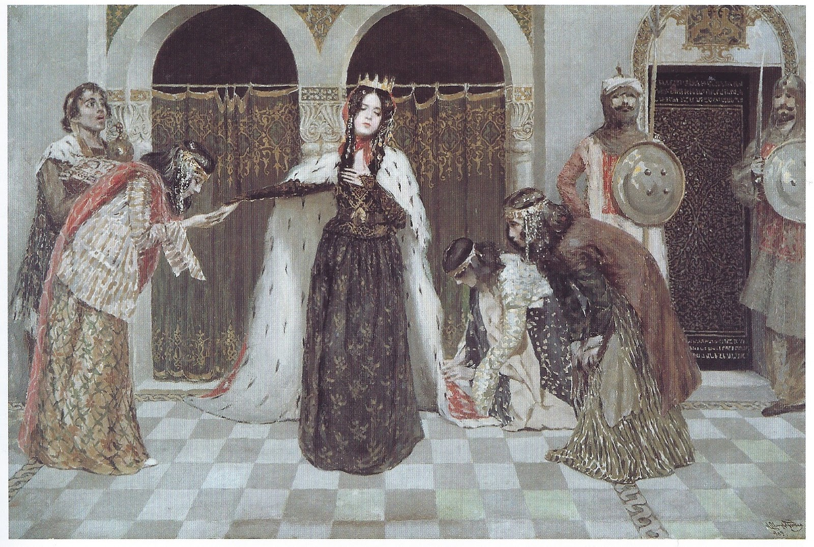 Վարդգես Սուրենյանց, «Զաբել թագուհու վերադարձը» (1909)